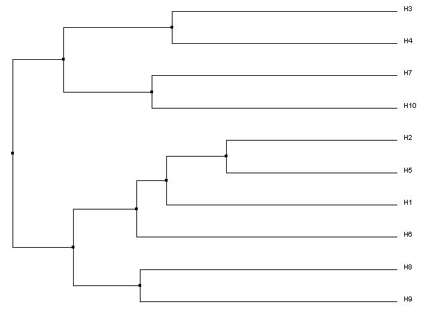 Een filogenetische boom van de verschillende varianten van Hemaglutinine